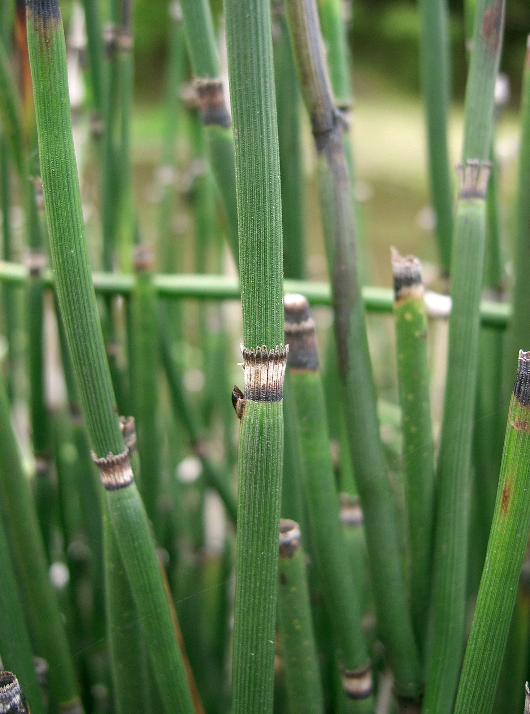 Equisetum hyemale